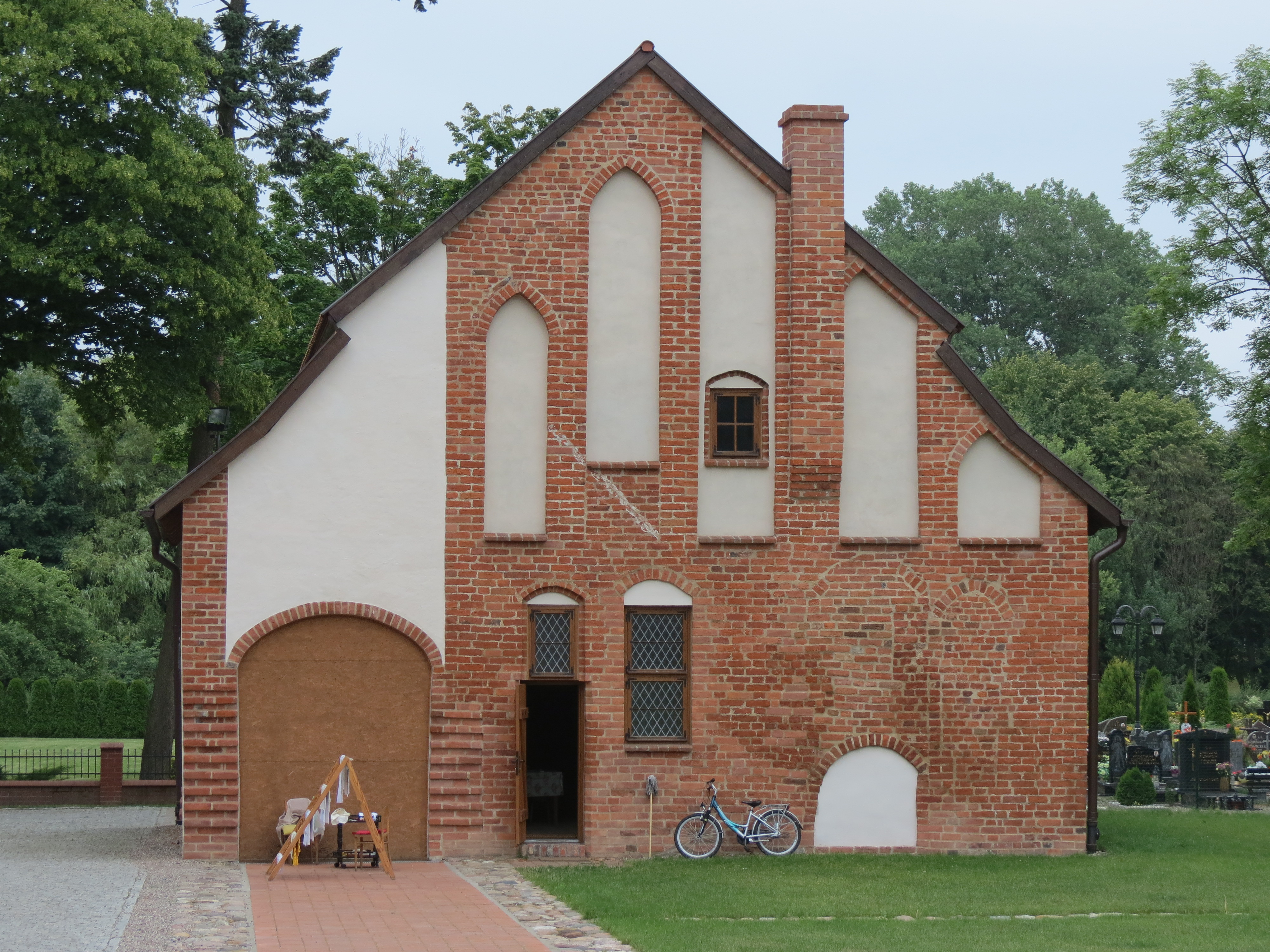 Kartuzy, erem, ob. dom kościelnego, 1383-1405, XX